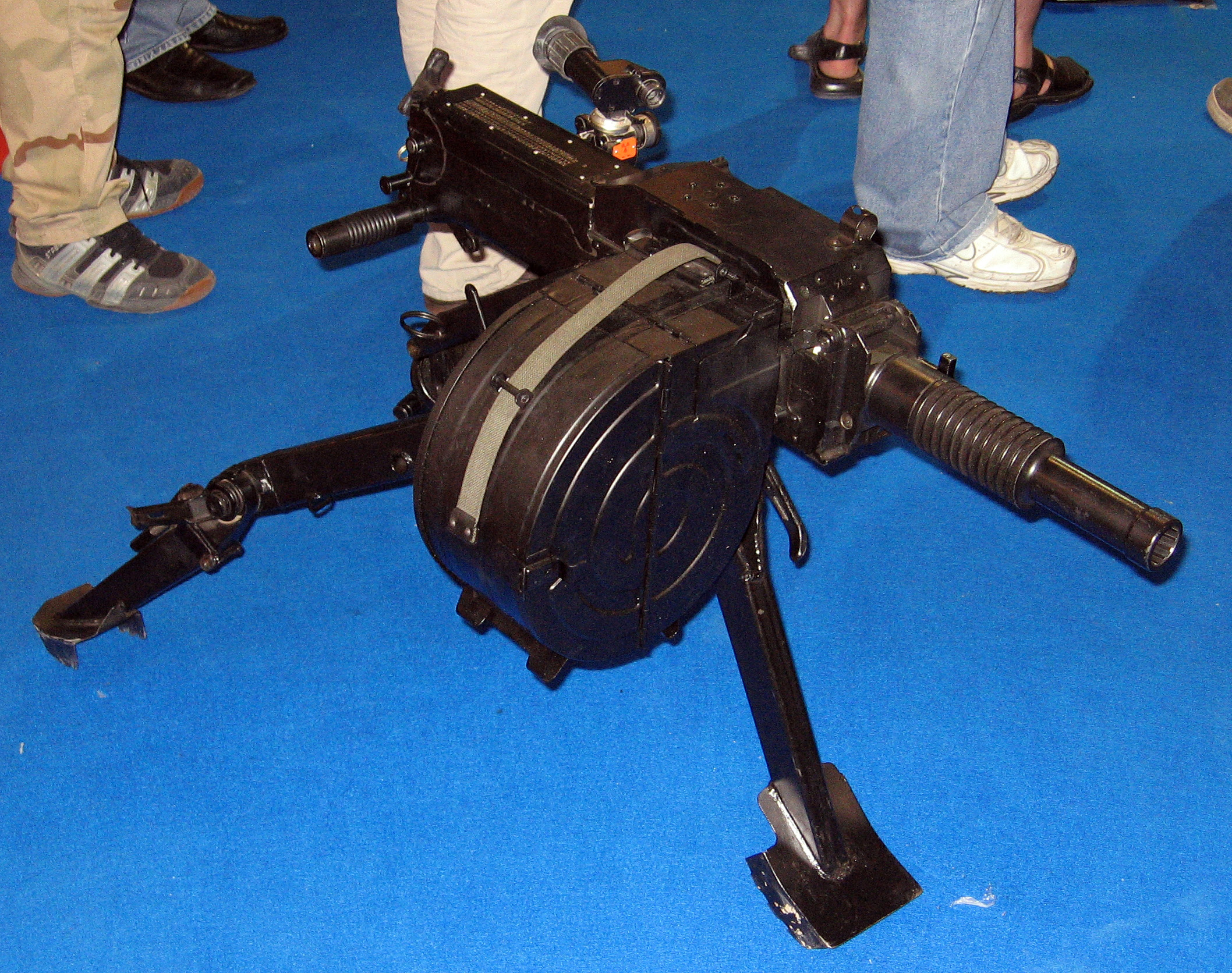 Automatic grenade launcher Zastava BGA 30mm, Serbia.